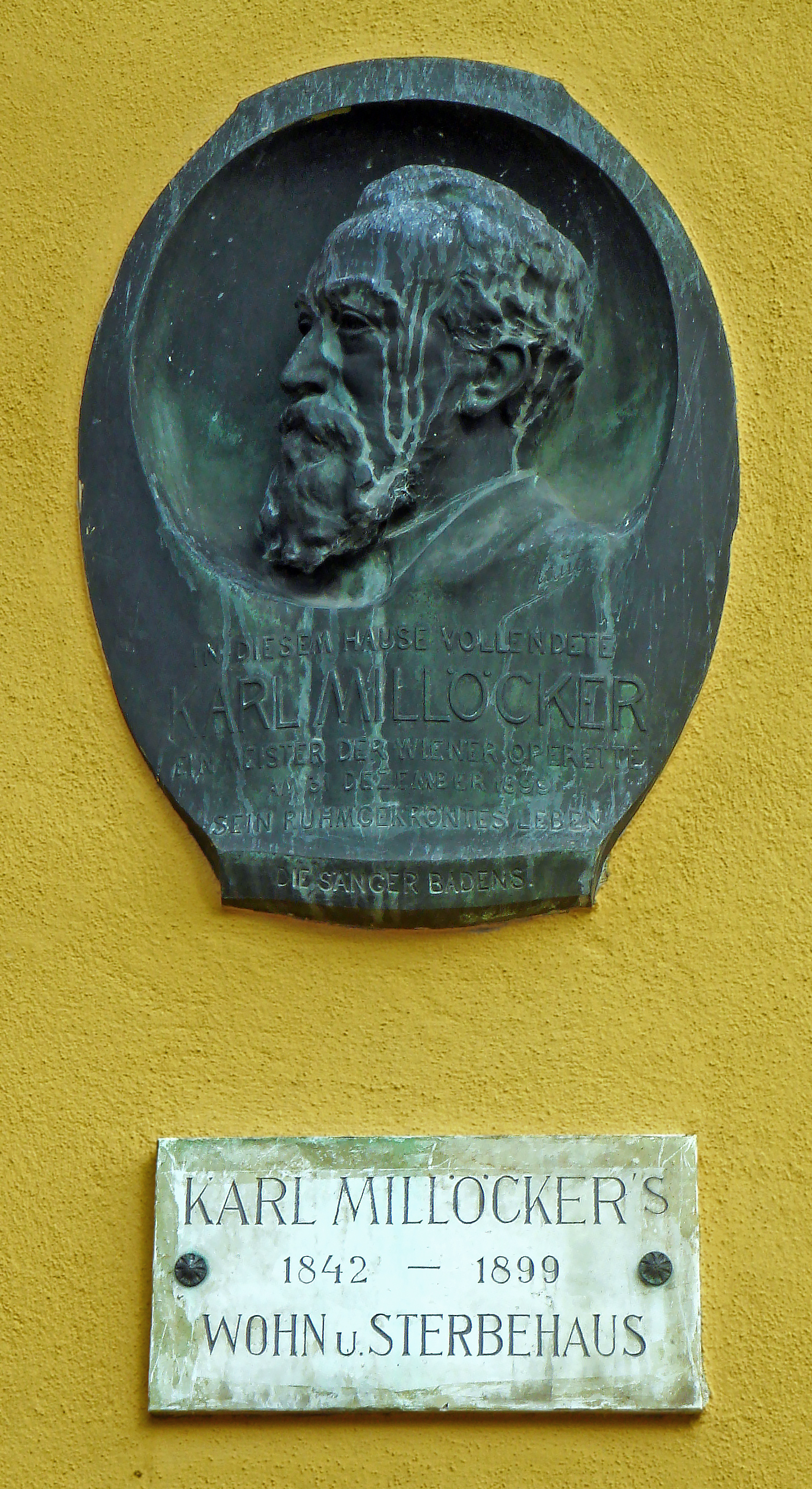 Gedenktafel (aus 1925) am Wohn- und Sterbehaus von Carl Millöcker, Conrad-von-Hötzendorf-Platz 8, Baden bei WienReliefportrait: Hans Mauer (1879–1962)